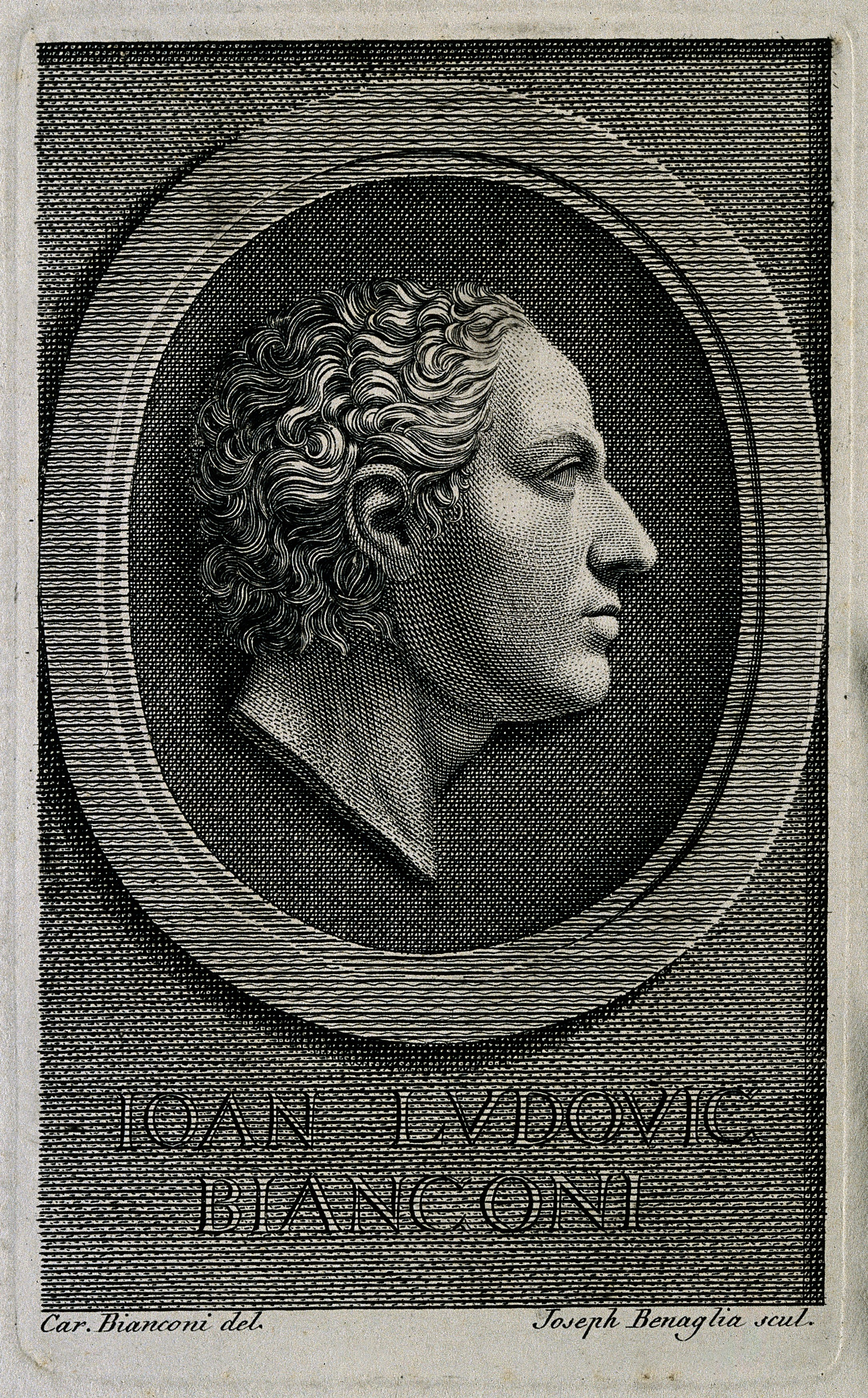 Giovanni Lodovico Bianconi. Line engraving by J. Benaglia after C. Bianconi. Iconographic Collections Keywords: portrait prints; bianconi, giovanni lodovico, 1; engravings; Giovanni Lodovico Bianconi